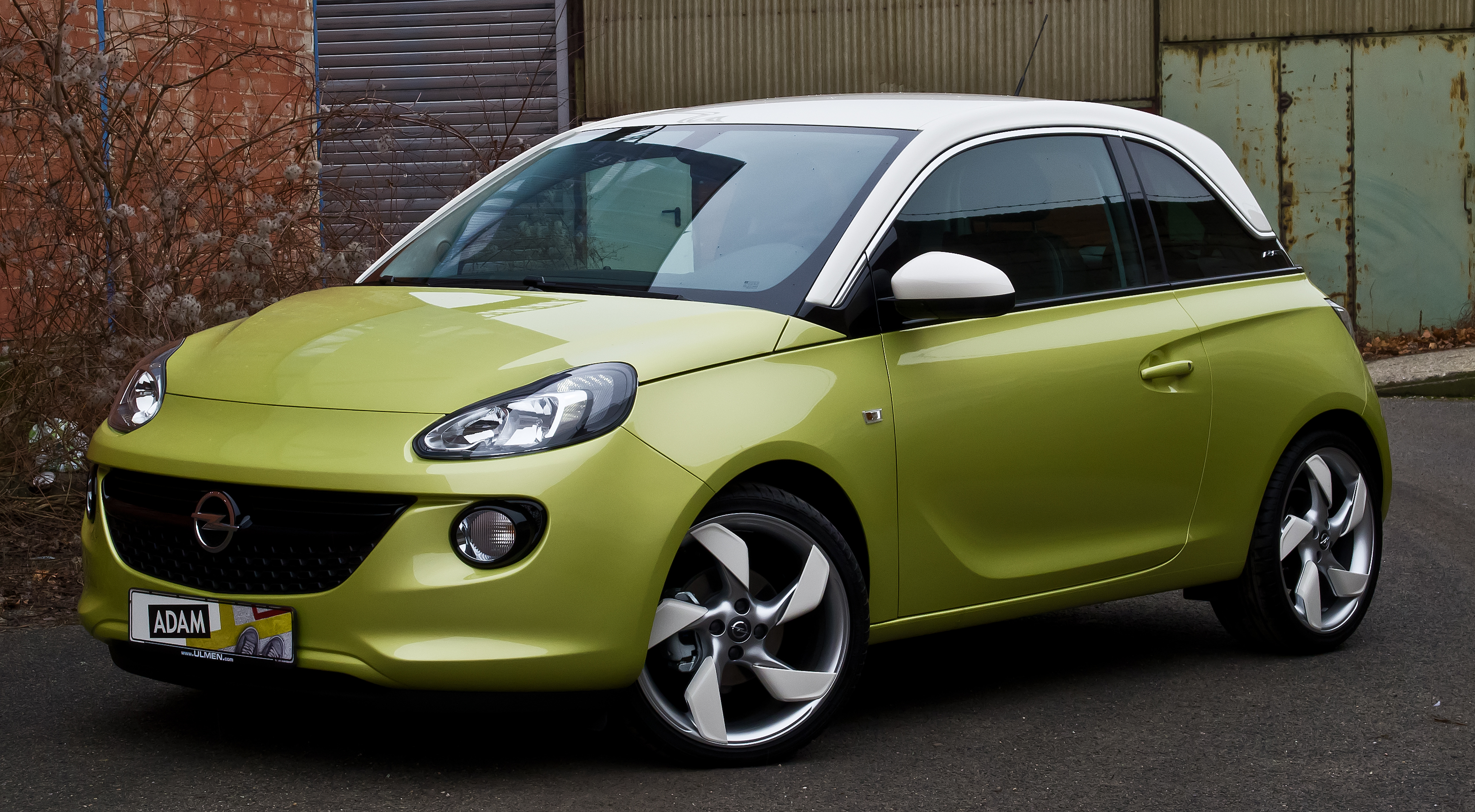 Opel Adam 1.4 Slam